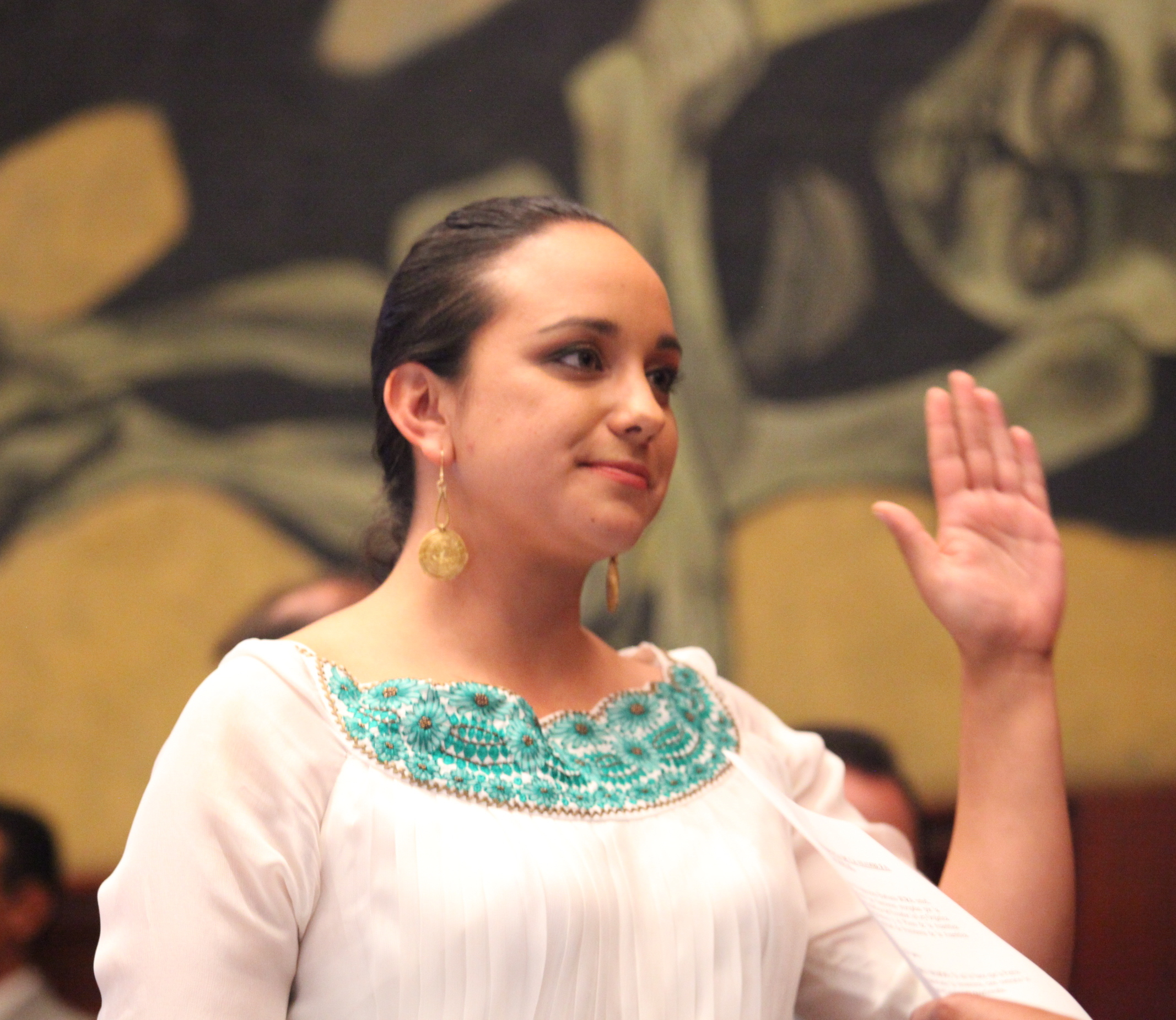 Foto: Hugo Ortiz Ron / Asamblea Nacional